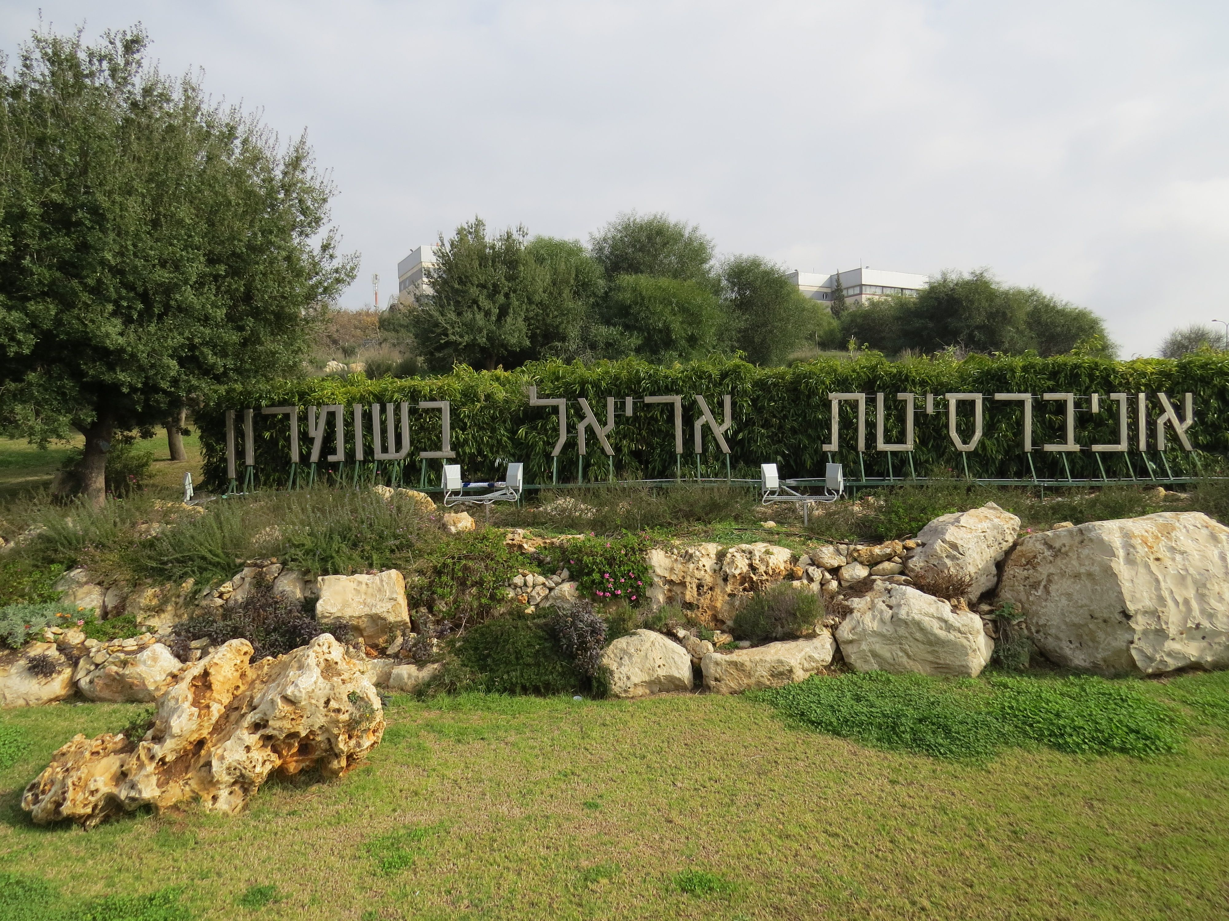 Ariel_University_sign